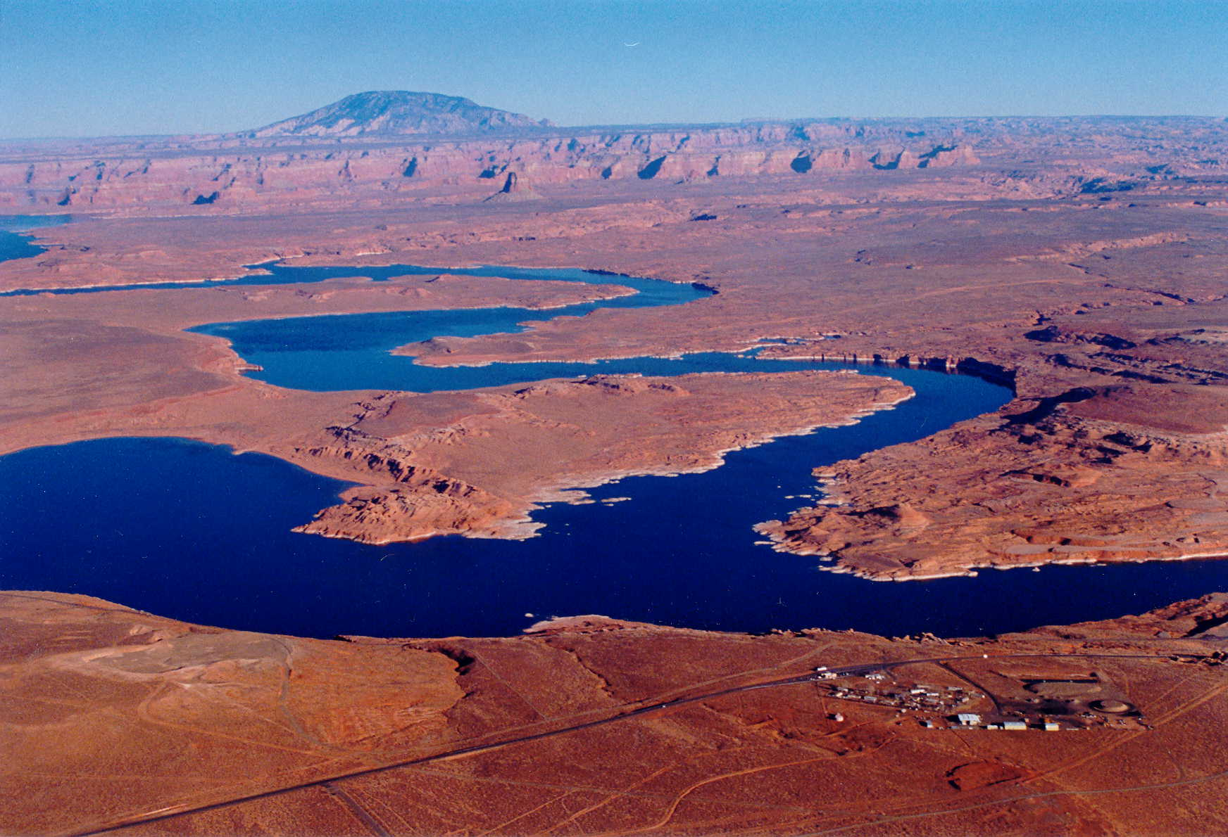 Lake Powell aus der Vogelperspektive